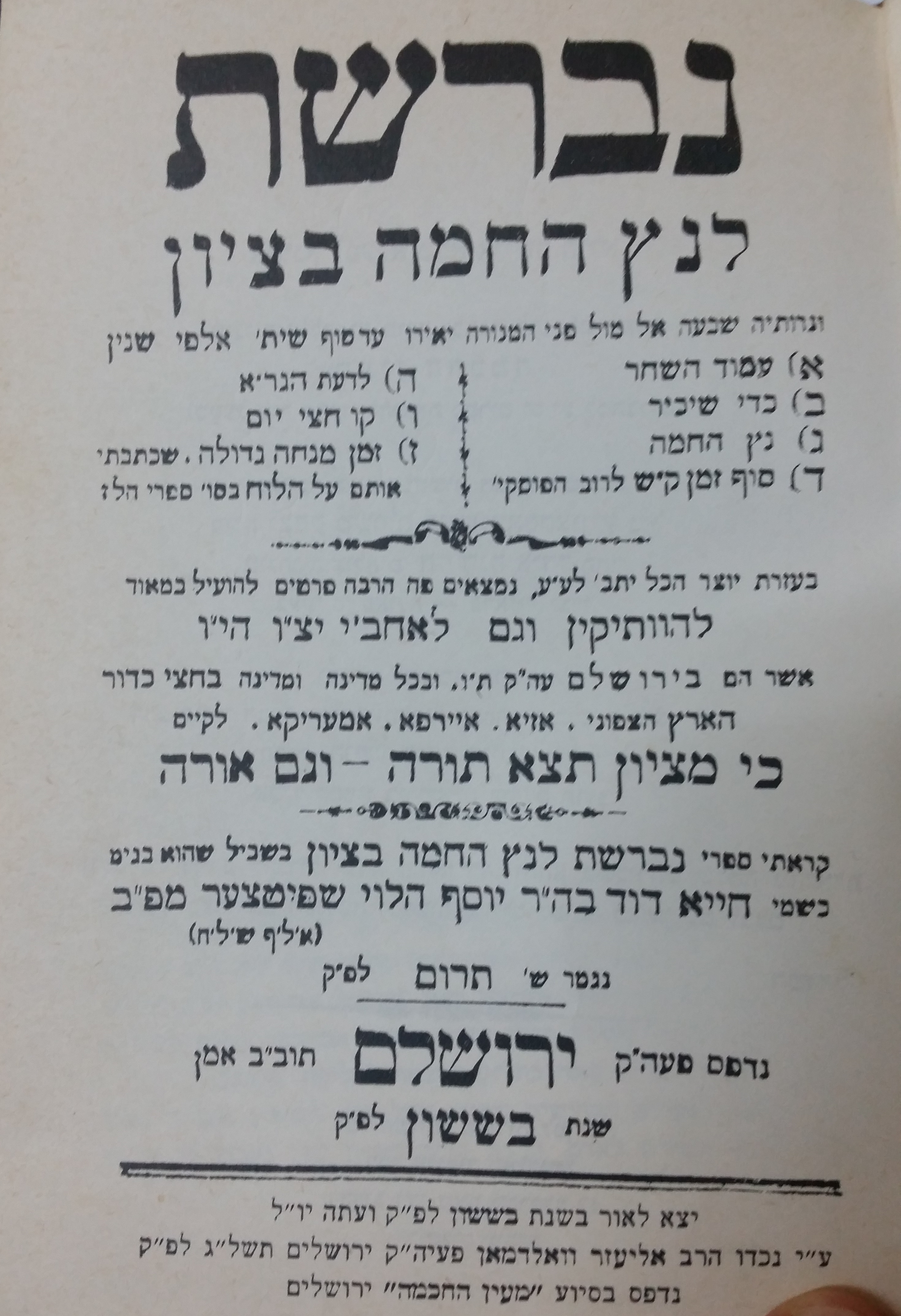 דף הפתיחה של הספר